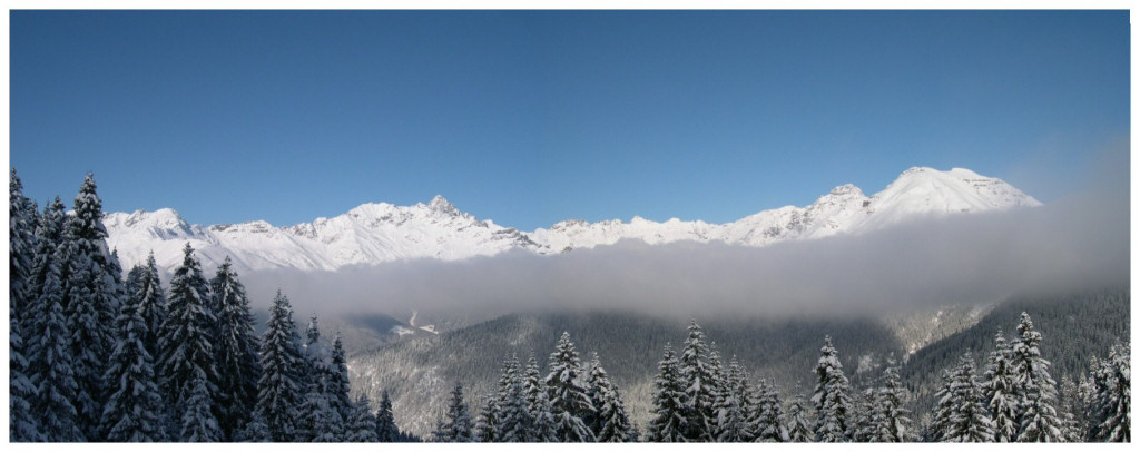 Vista delle Orobie dalle piste da sci di Spiazzi. Foto scattata da Stefano Trezzi (Utente:Yoruno) e da me licenziata in base alla licenza sotto indicata.